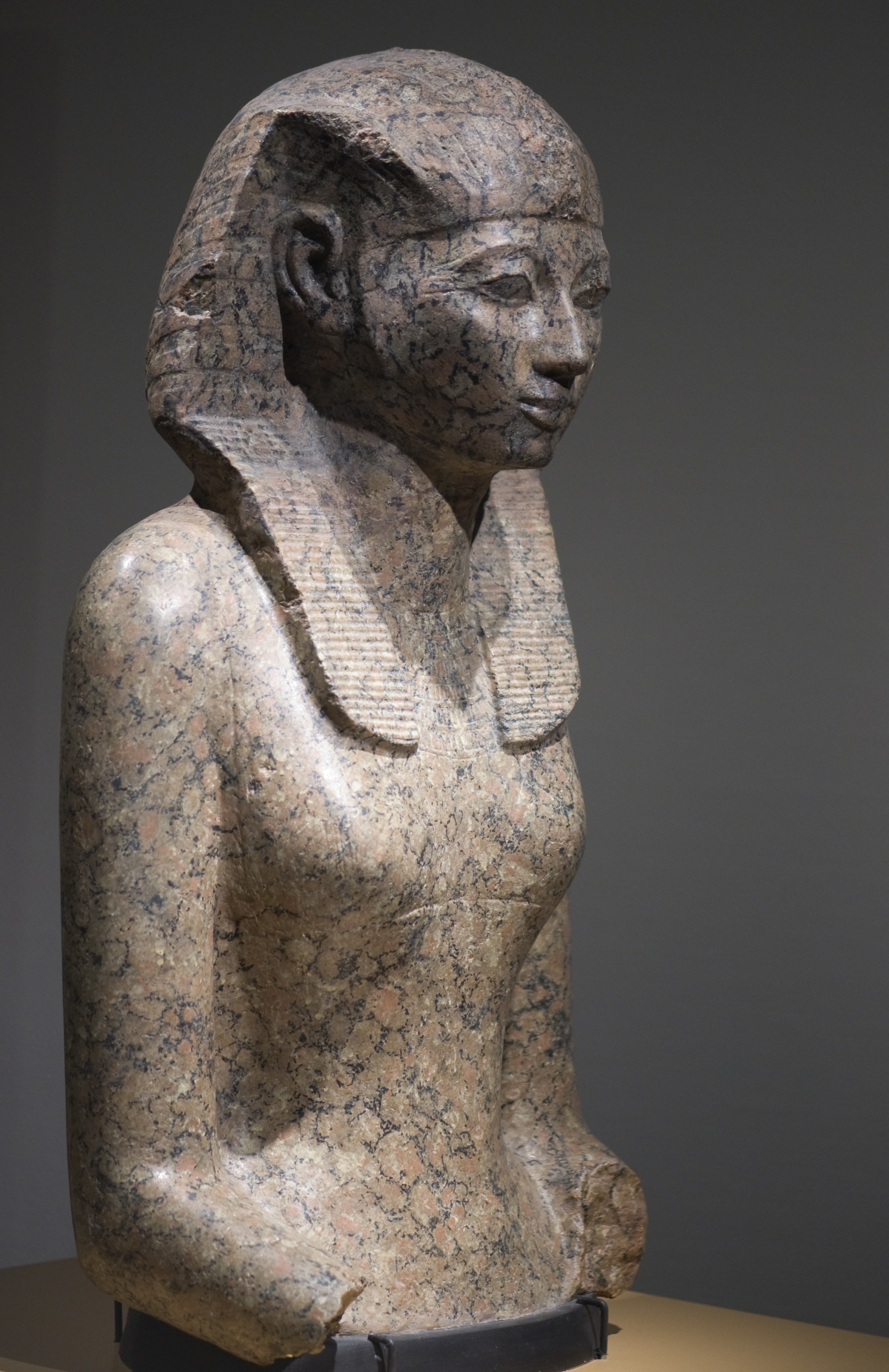 Beeld van koningin Hatsjepsoet Maat-ka-Re Hatsjepsoet (RMO)